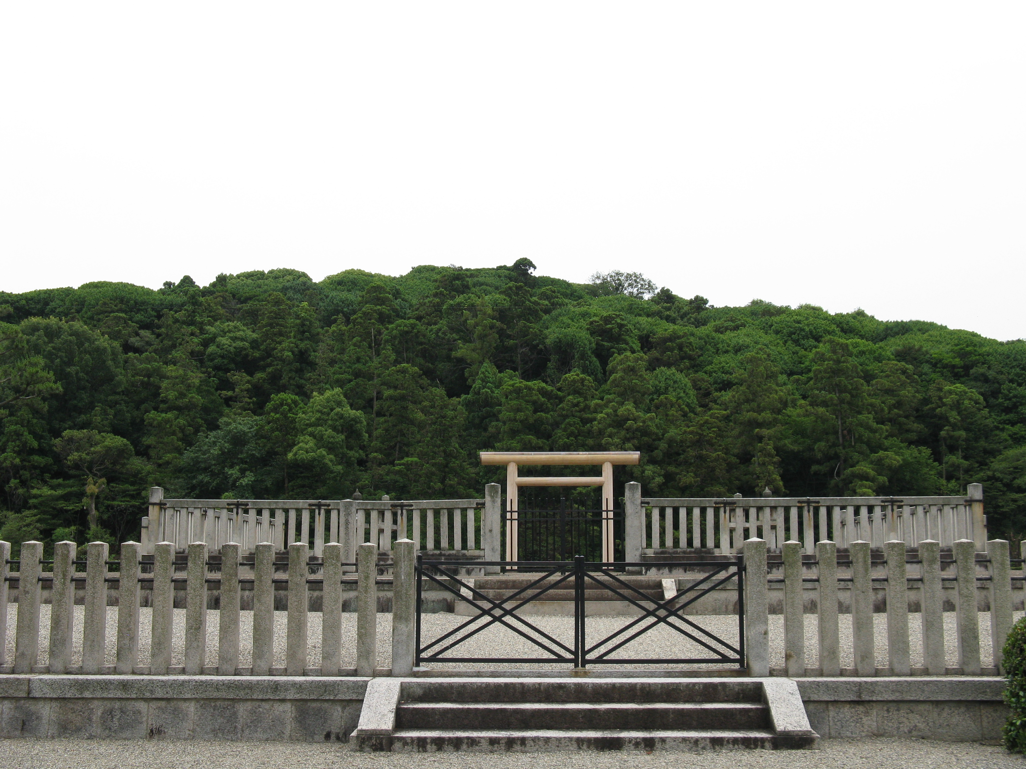 恵我藻伏岡陵、誉田御廟山古墳、応神天皇陵